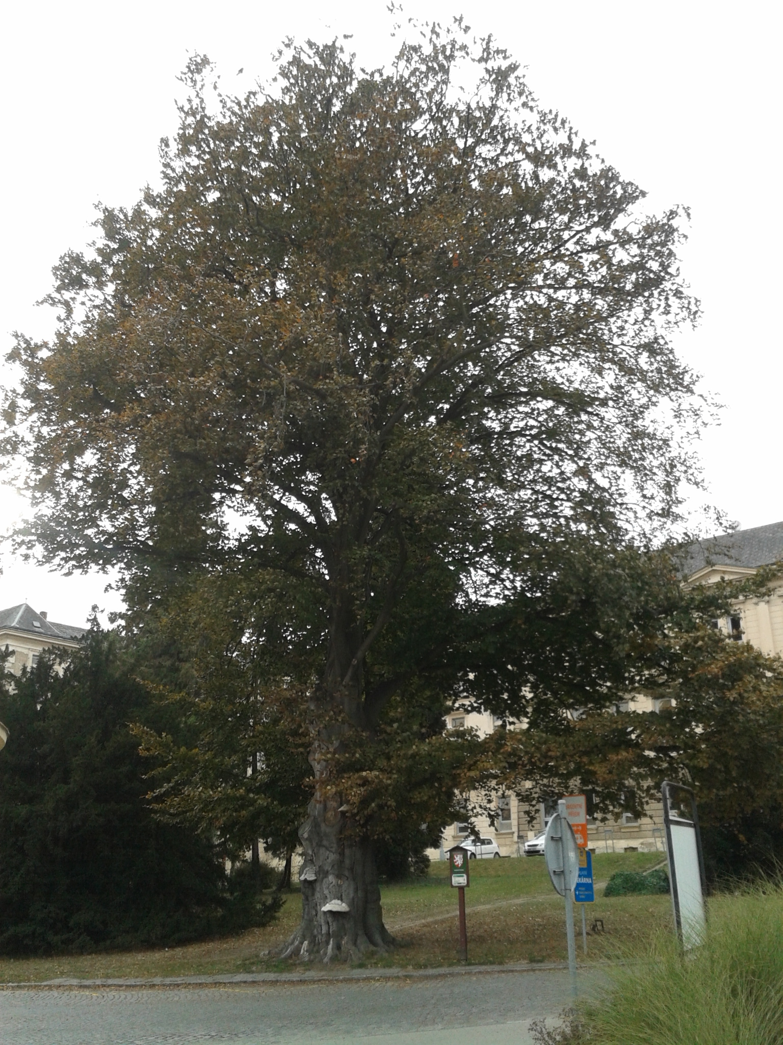 Buk ve Fakultní nemocnici